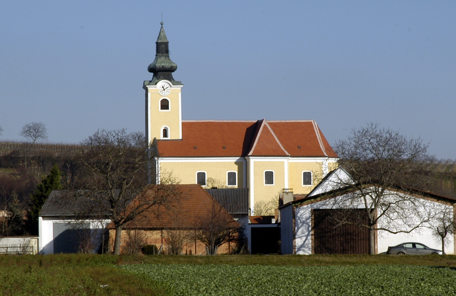 Südansicht der kath. Pfarrkirche hl. Nikolaus in Röschitz